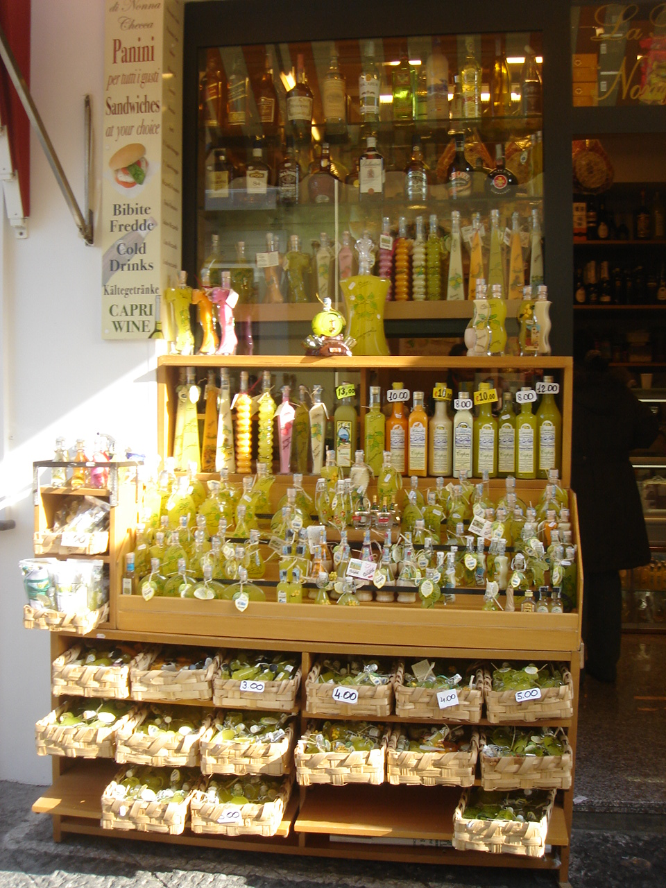 イタリアのリモンチェッロ。